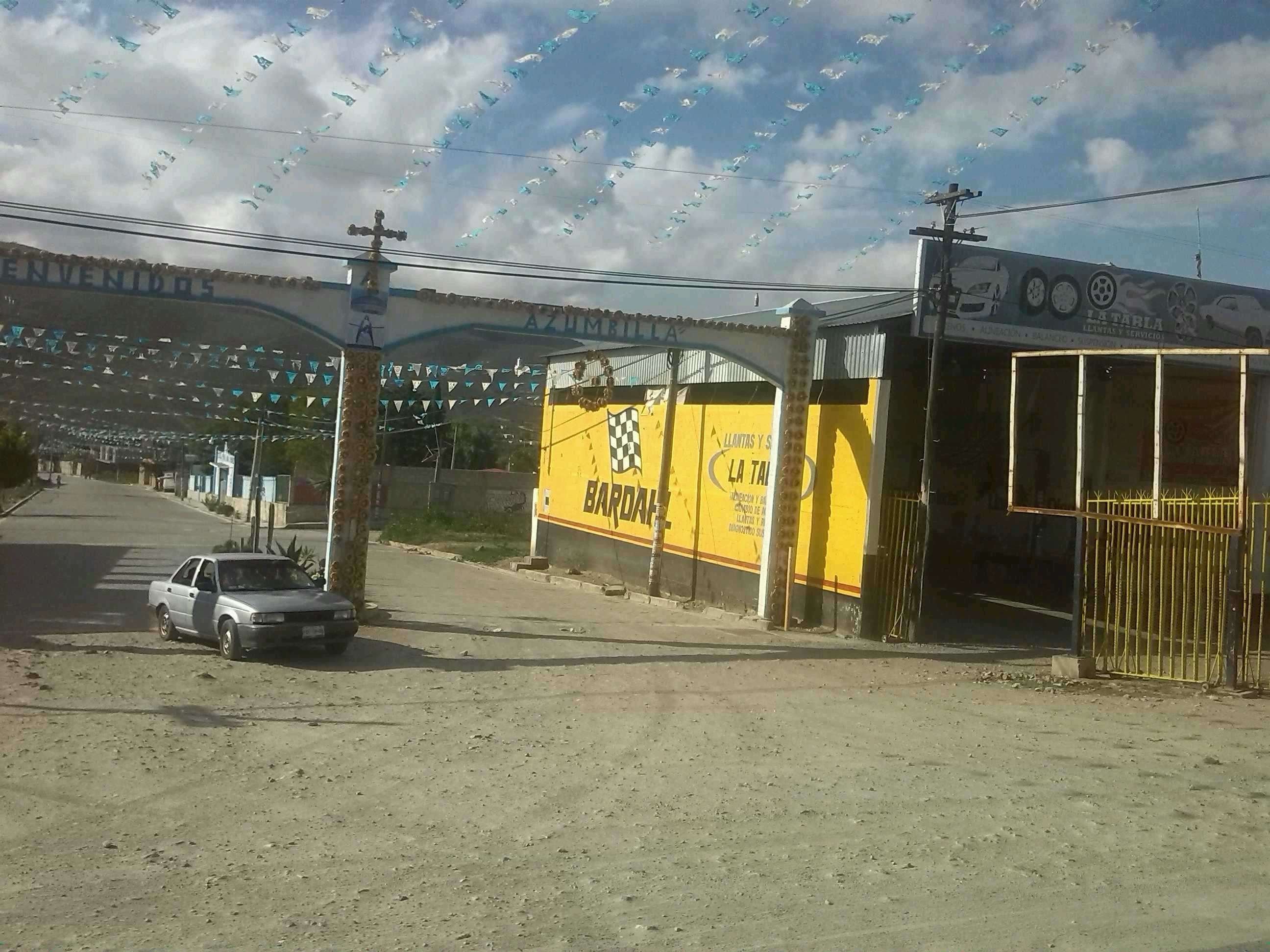 Entrada a Azumbilla, Puebla